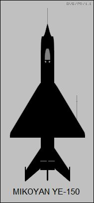 YE-150